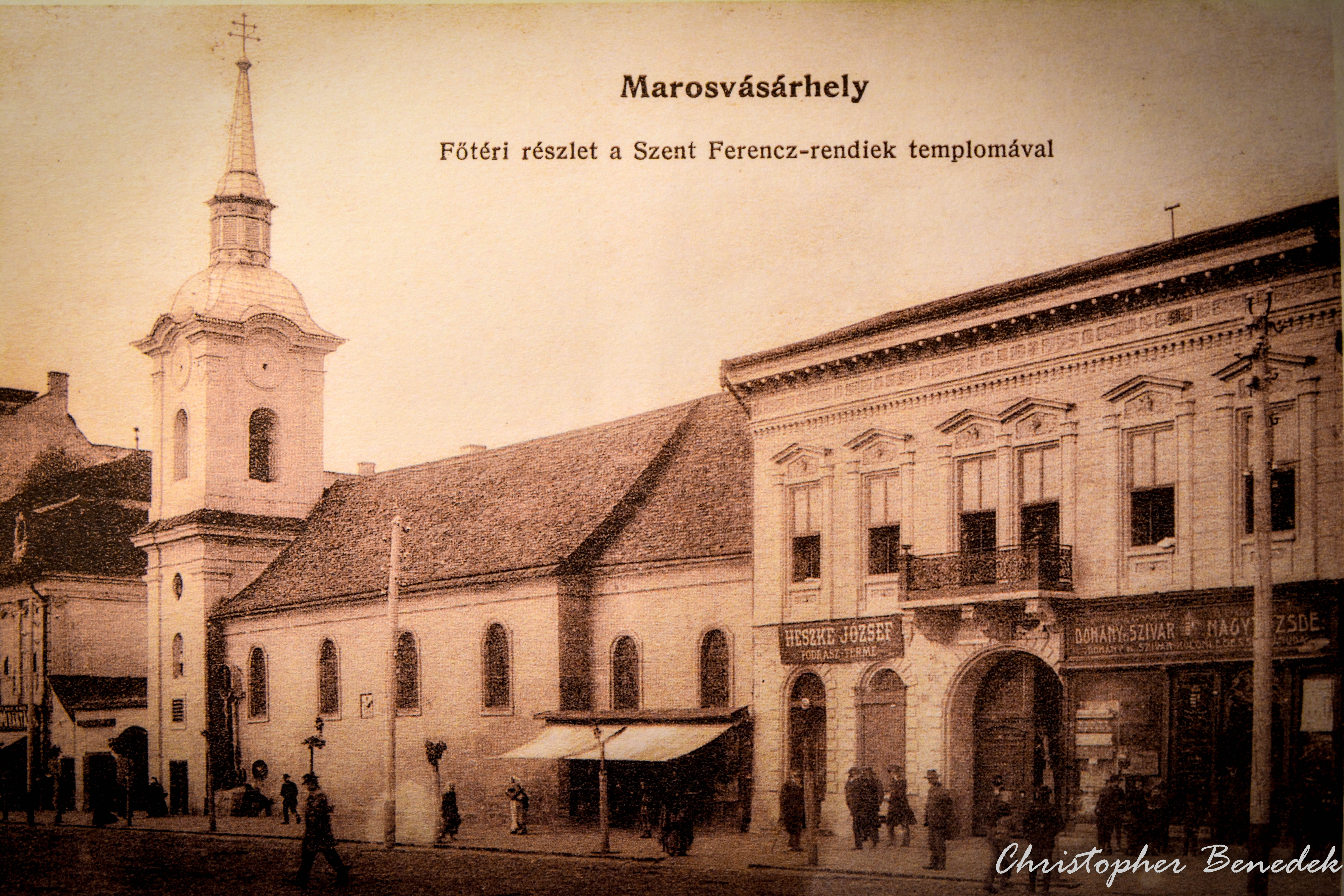 Az egykori Barátok-temploma